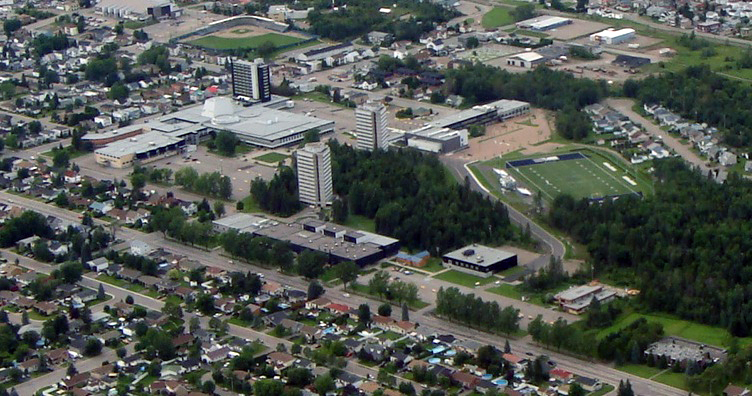 Vue aérienne de Saguenay.